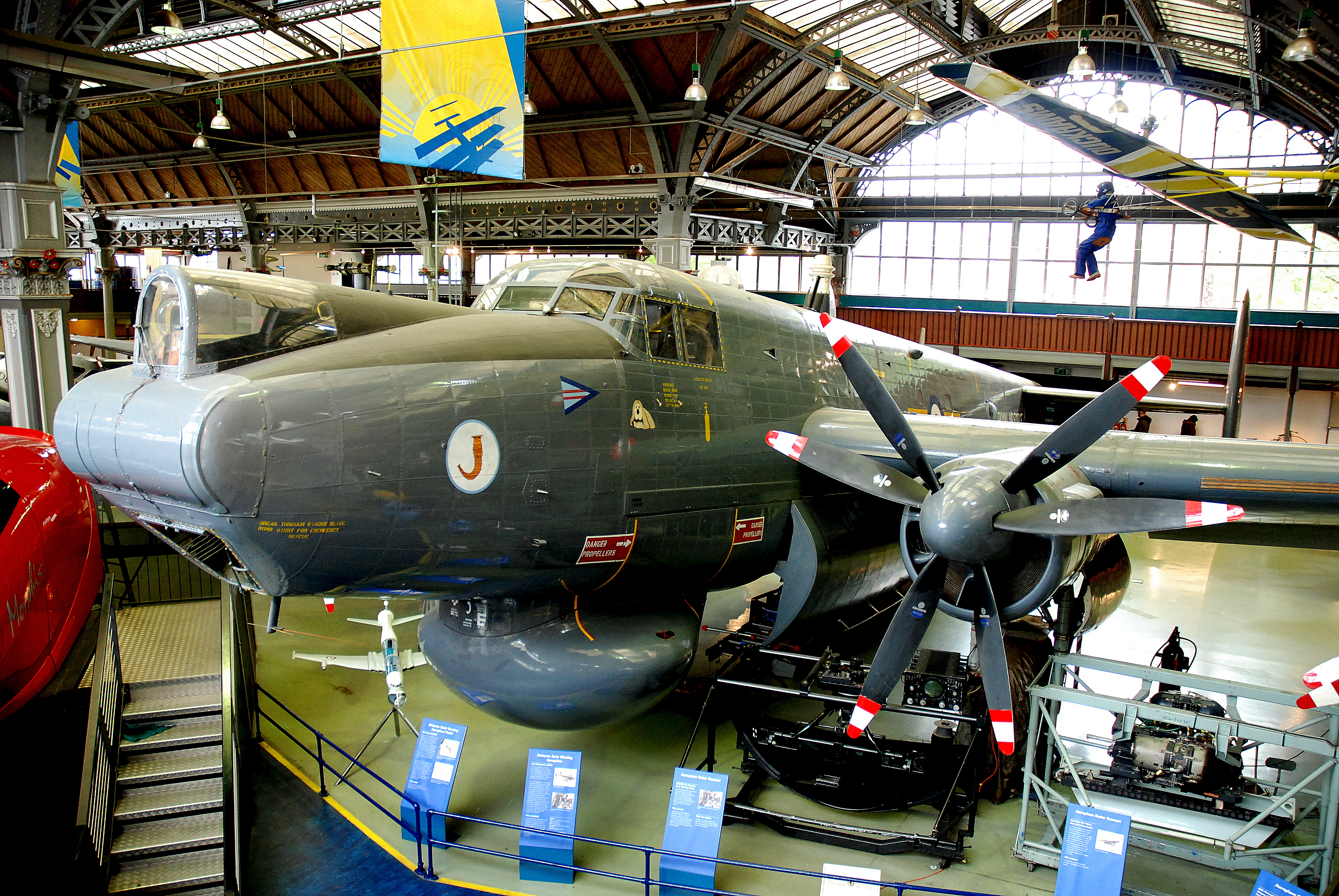 De Avro Shackleton in het Museum of Science and Industry in Manchester, Engeland